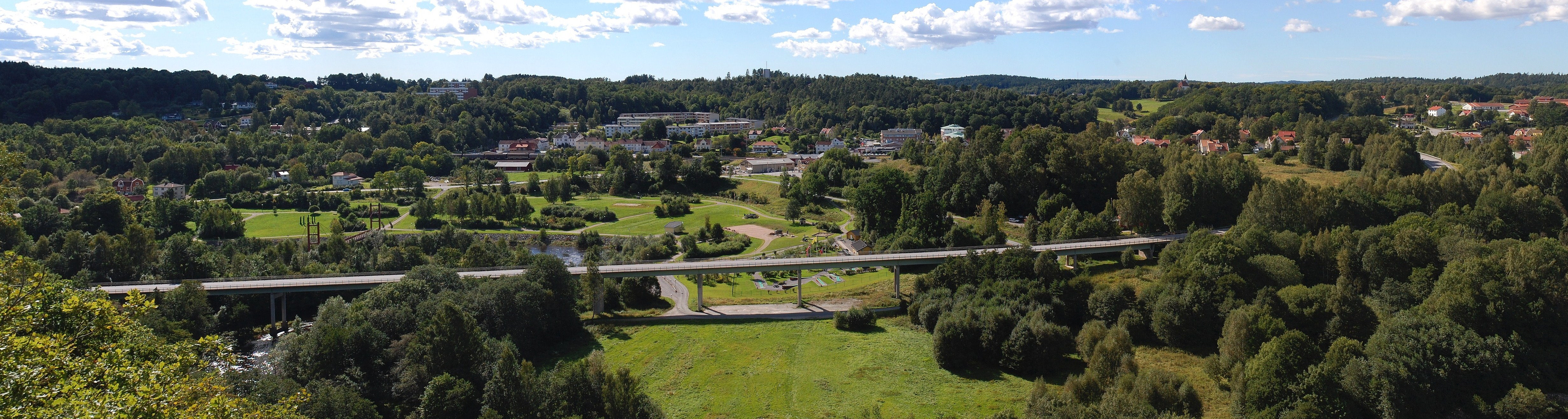 Munkedalscentrum